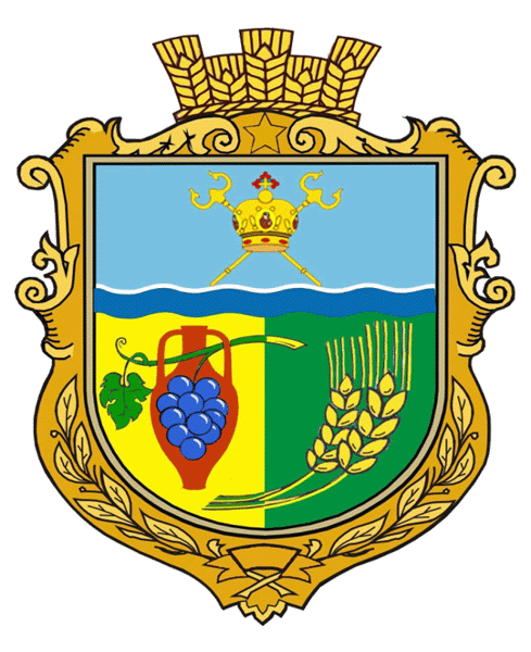 Герб Миколаївського району Миколаївської області